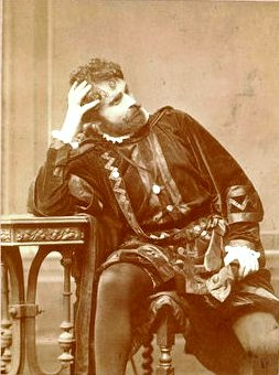 Ódry Lehel (1837-1920) 1885. március 22-én a bécsi udvari operában vendégszerepelt Hamletként.